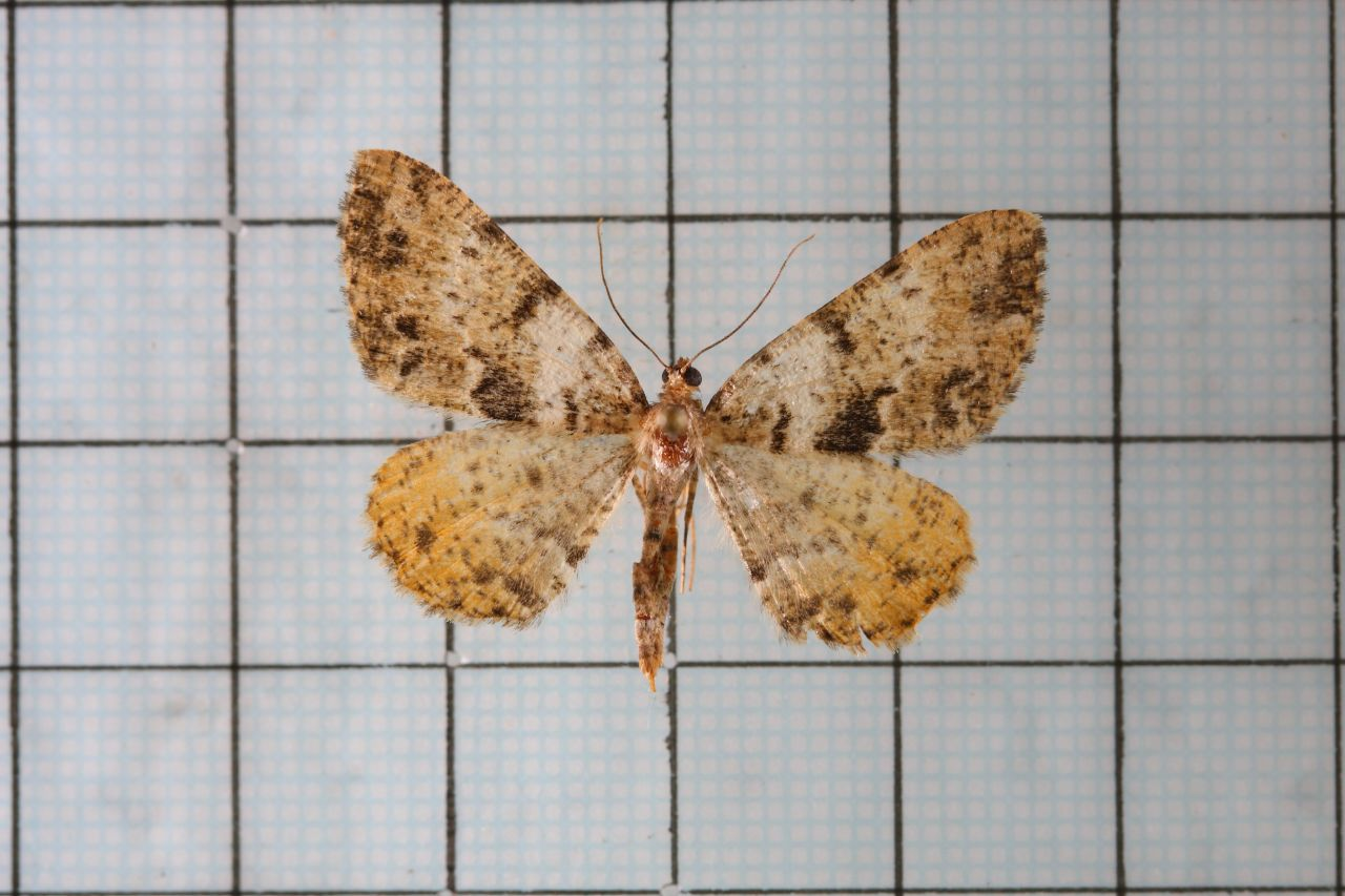 Psilalcis nigrifasciata (Wileman, 1912) 黃星尺蛾 鞍1:P.25,Pl.5-12